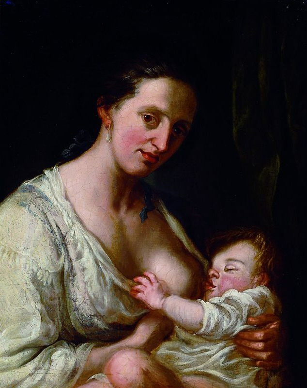 Stillende Mutter